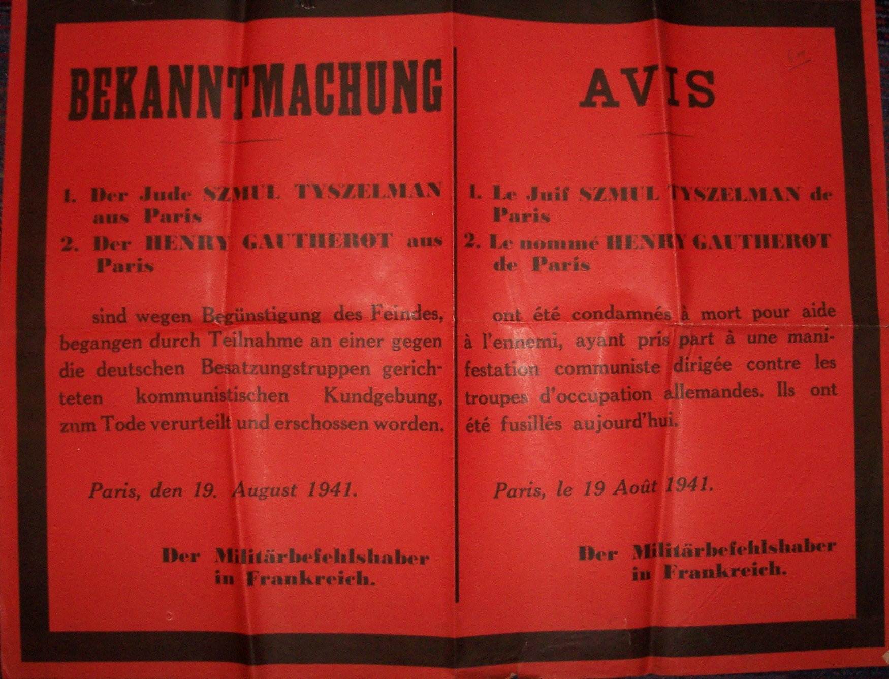 Affiche "Avis d'exécution des 2 jeunes communistes Tyszelman et Gautherot, 19 Août 1941" trouvée aux archives départementales des Yvelines (300W 46)